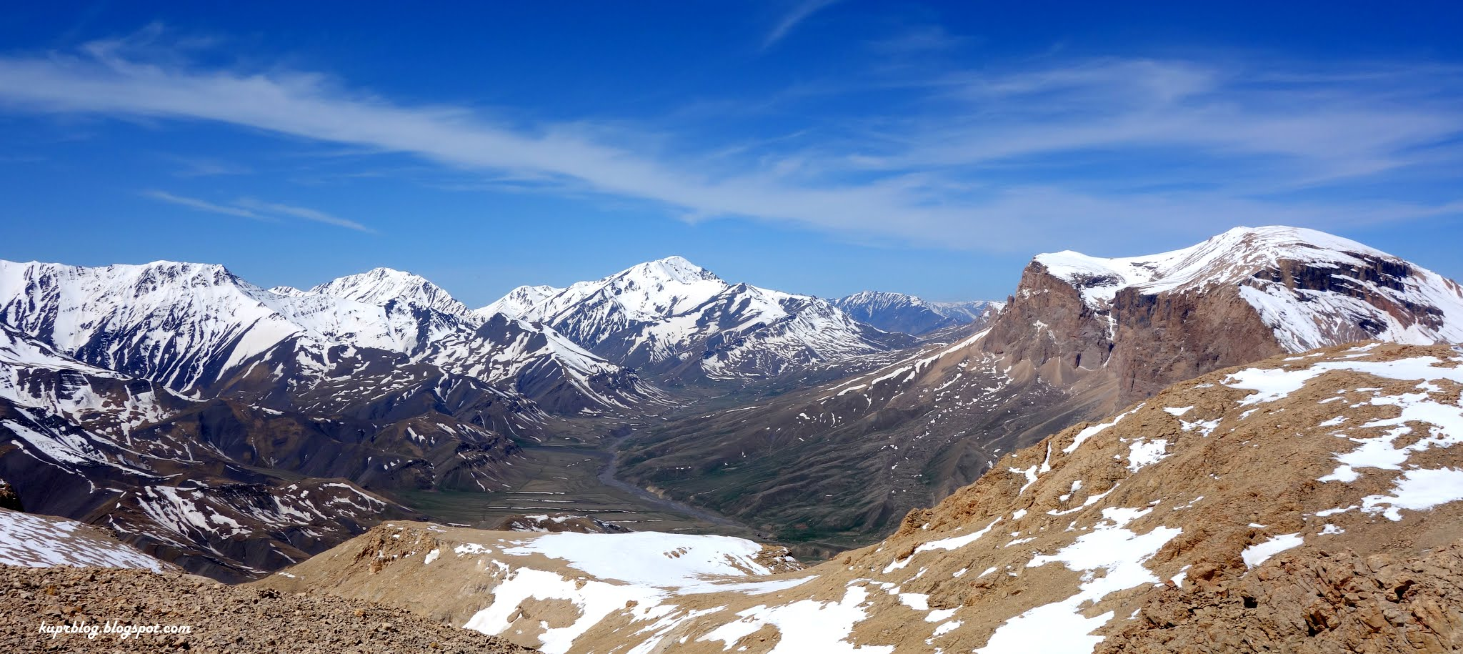 Долина Шахяйлаг. Горы Тфан, Базарюрт, Базардюзи и Шахдаг (слева направо)